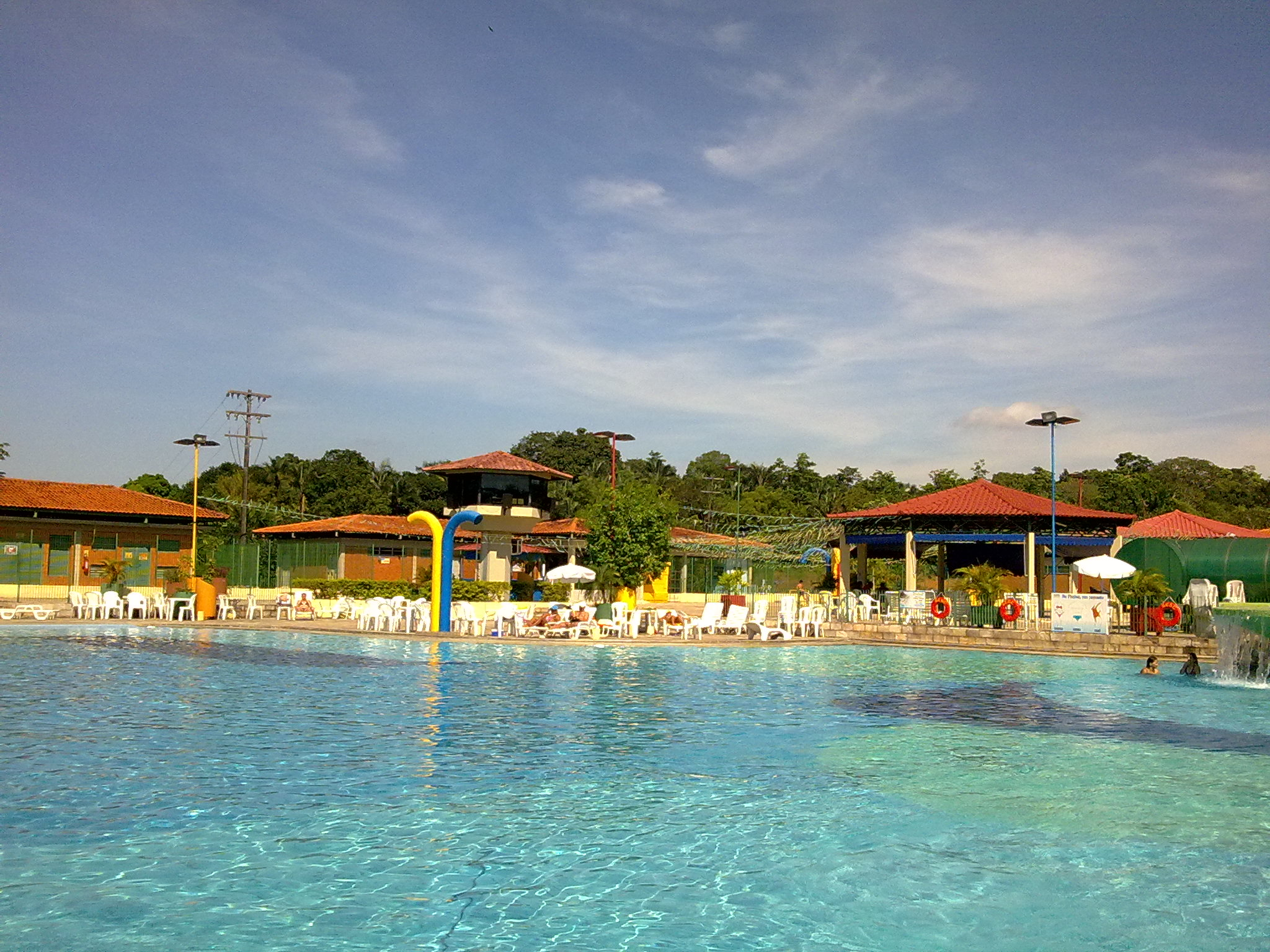 Piscina do Balneário do SESC-AM